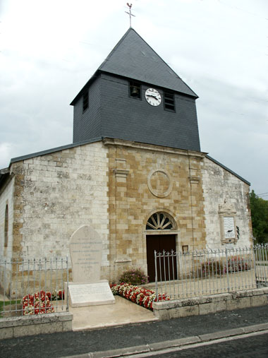 Eglise de Coole